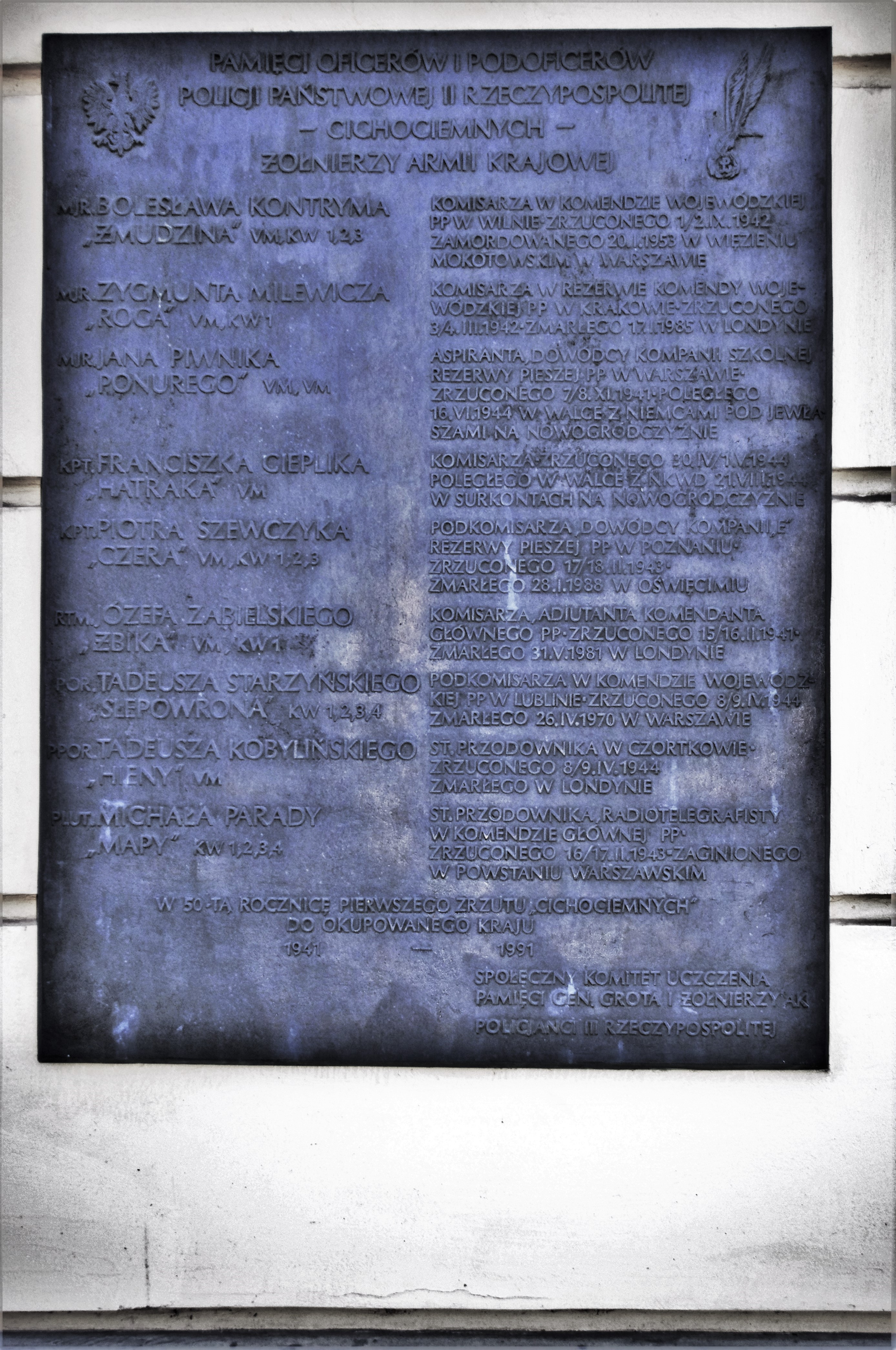 Tablica upamiętniająca oficerów i podoficerów policji państwowej II RP – cichociemnych żołnierzy AK na Pałacu Mostowskich w Warszawie. Na tablicy zostali upamiętnieni mjr. Zygmunt Kontrym „Żmudzin”, mjr. Jan Piwnik „Ponury”, kpt. Franciszek Cieplik „Hatrak”, kpt. Piotr Szewczyk „Czer”, rtm. Józef Zabielski „Żbik”, por. Tadeusz Starzyński „Ślepowrona”, ppor. Tadeusz Kobyliński „Hiena”, plut. Michał Parada „Mapa”.